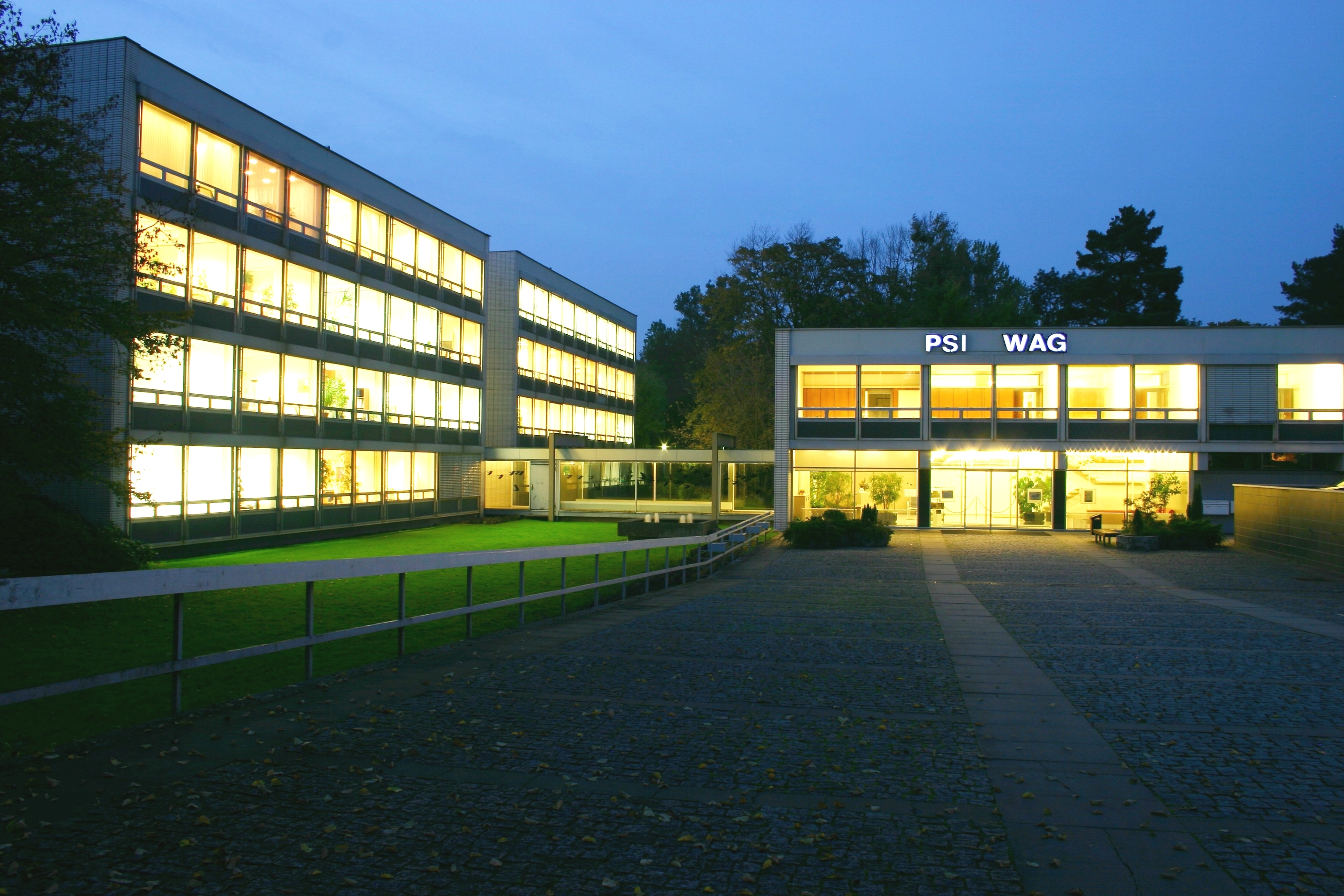 Verwaltungsgebäude der Preussag Immobilien GmbH in Salzgitter